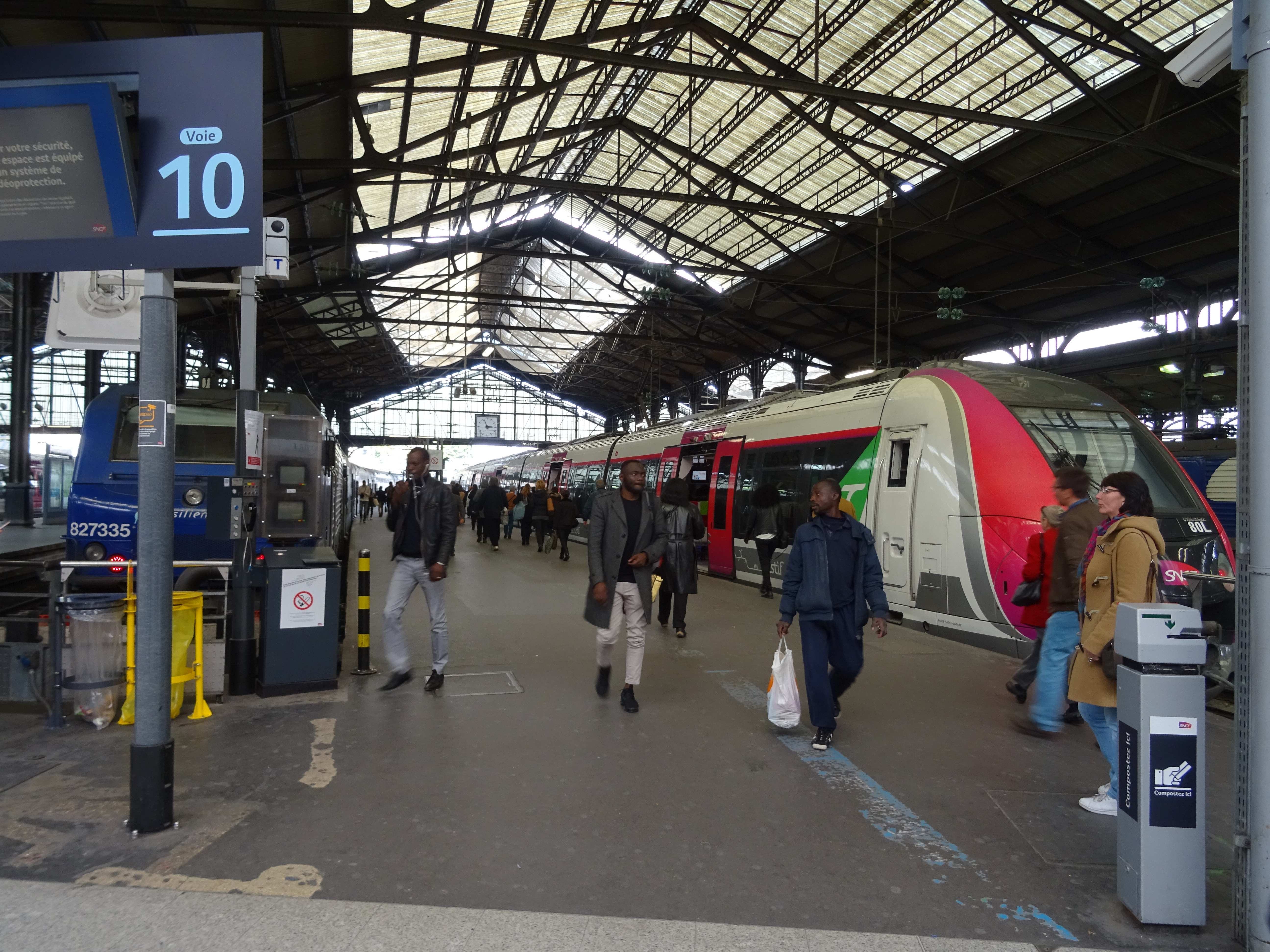 Francilien à Paris Saint-Lazare